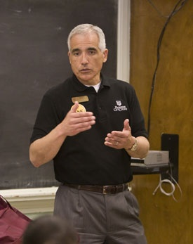 Mark Rocha in 2010.